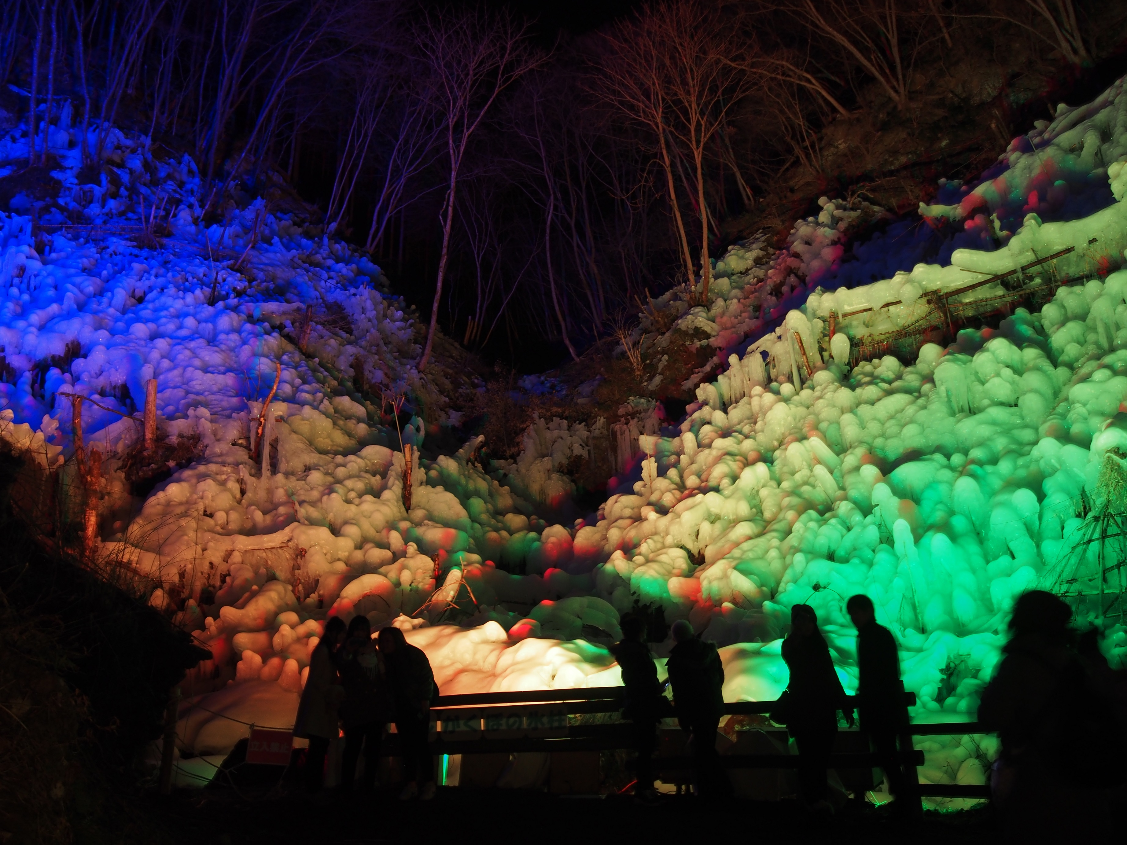 埼玉県横瀬町のあしがくぼの氷柱、ライトアップの様子